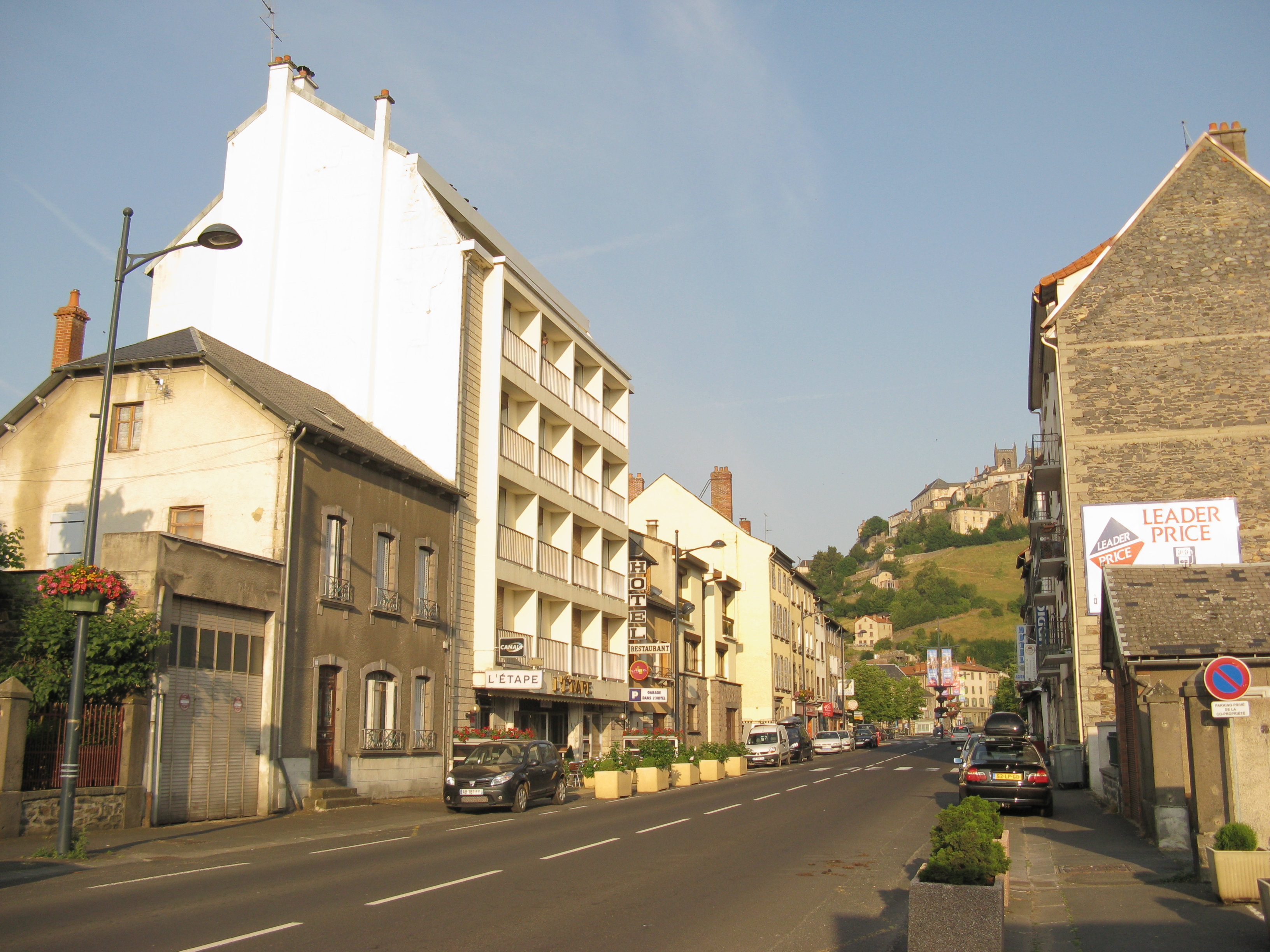 Saint-Flour, France